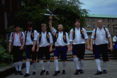 Die Newcastle Kingsmen Schwerttänzer beim Aufführen des Rapper-Kettenschwerttanzes (siehe Rapper Sword) in Mai 1999. Diese Figur ist der »Stern«, die Endfigur des Tanzes